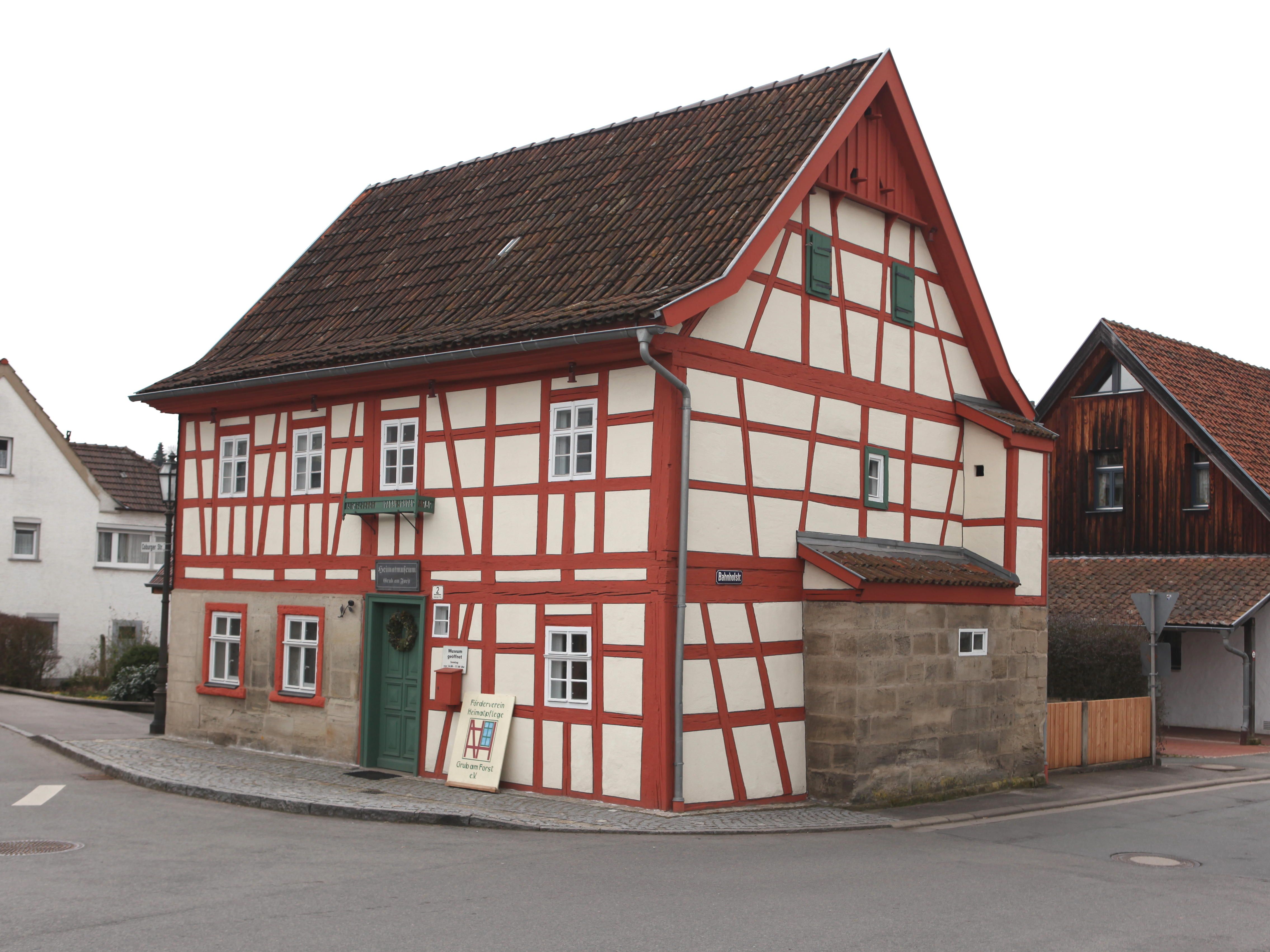 Grub am Forst, Reichenbachhaus